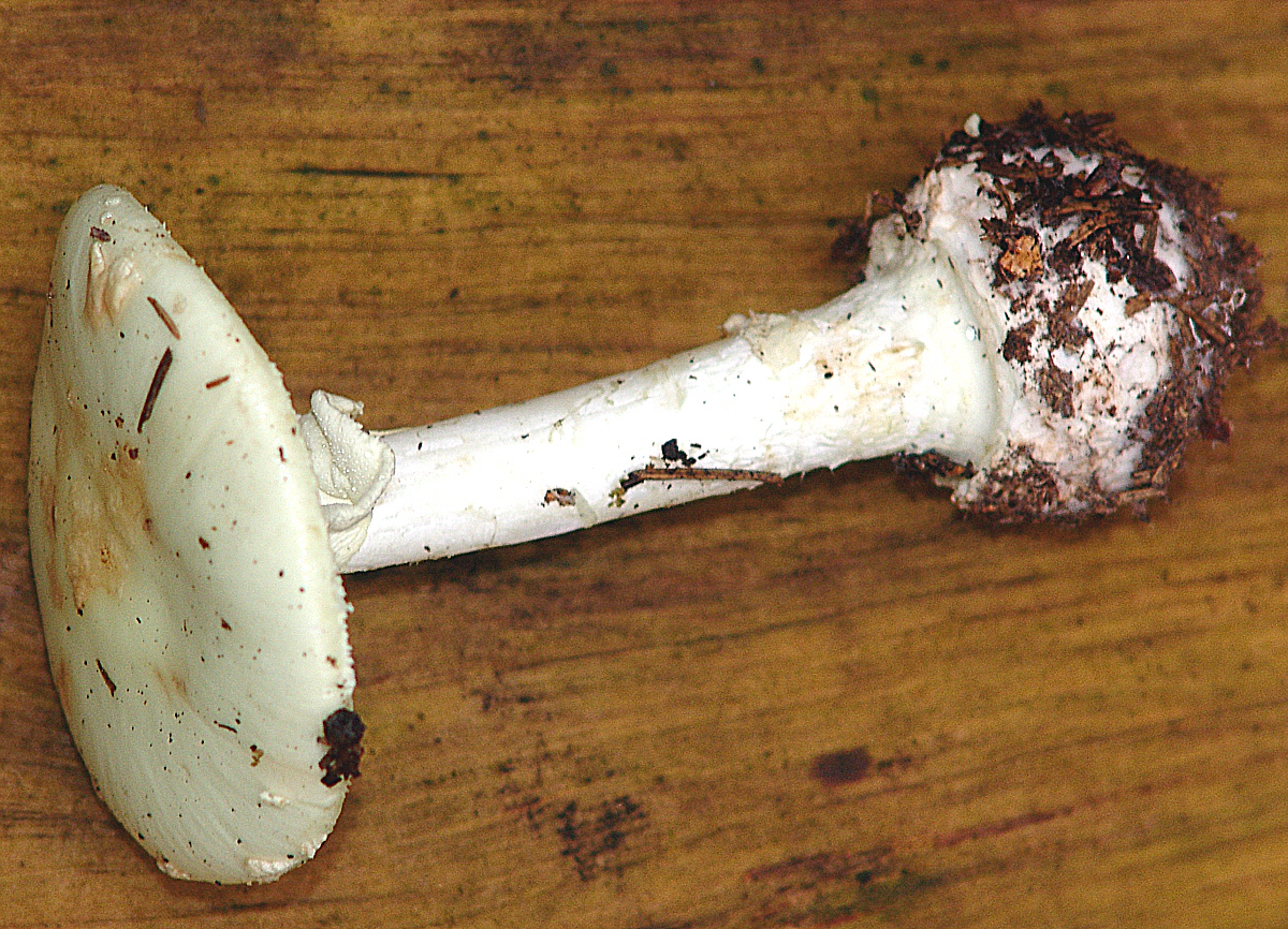 Ein Gelber Knollenblätterpilz, an dem die Knolle schön zu sehen ist. Fotograf: Walter J. Pilsak, Waldsassen Datum: 2005 Copyright Status: GNU Freie Dokumentationslizenz